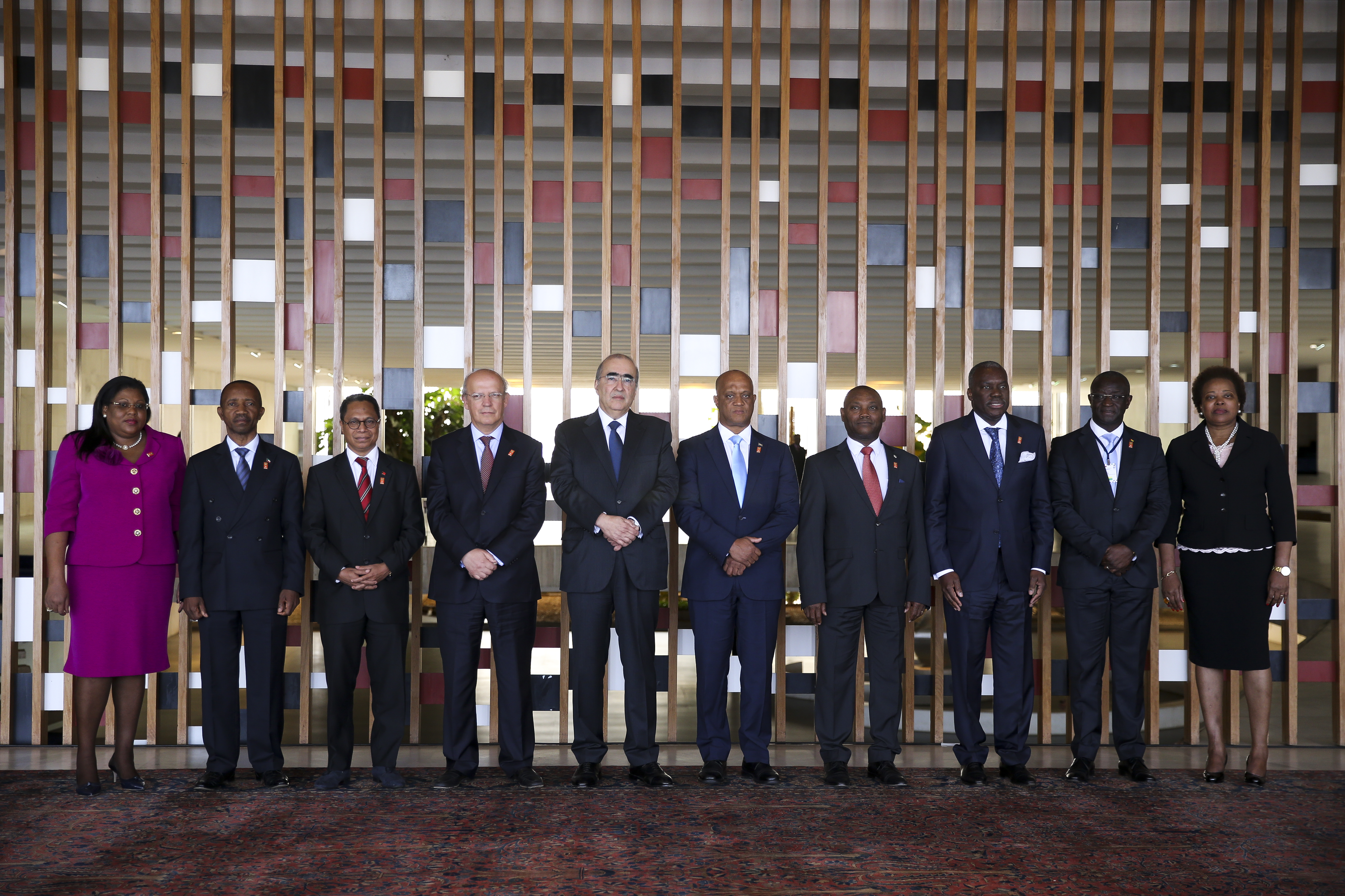 Brasília - Cerimônia de assinatura do termo final da 22ª Reunião Ordinária do Conselho de Ministros da Comunidade dos Países de Língua Portuguesa (CPLP) (Marcelo Camargo/Agência Brasil)